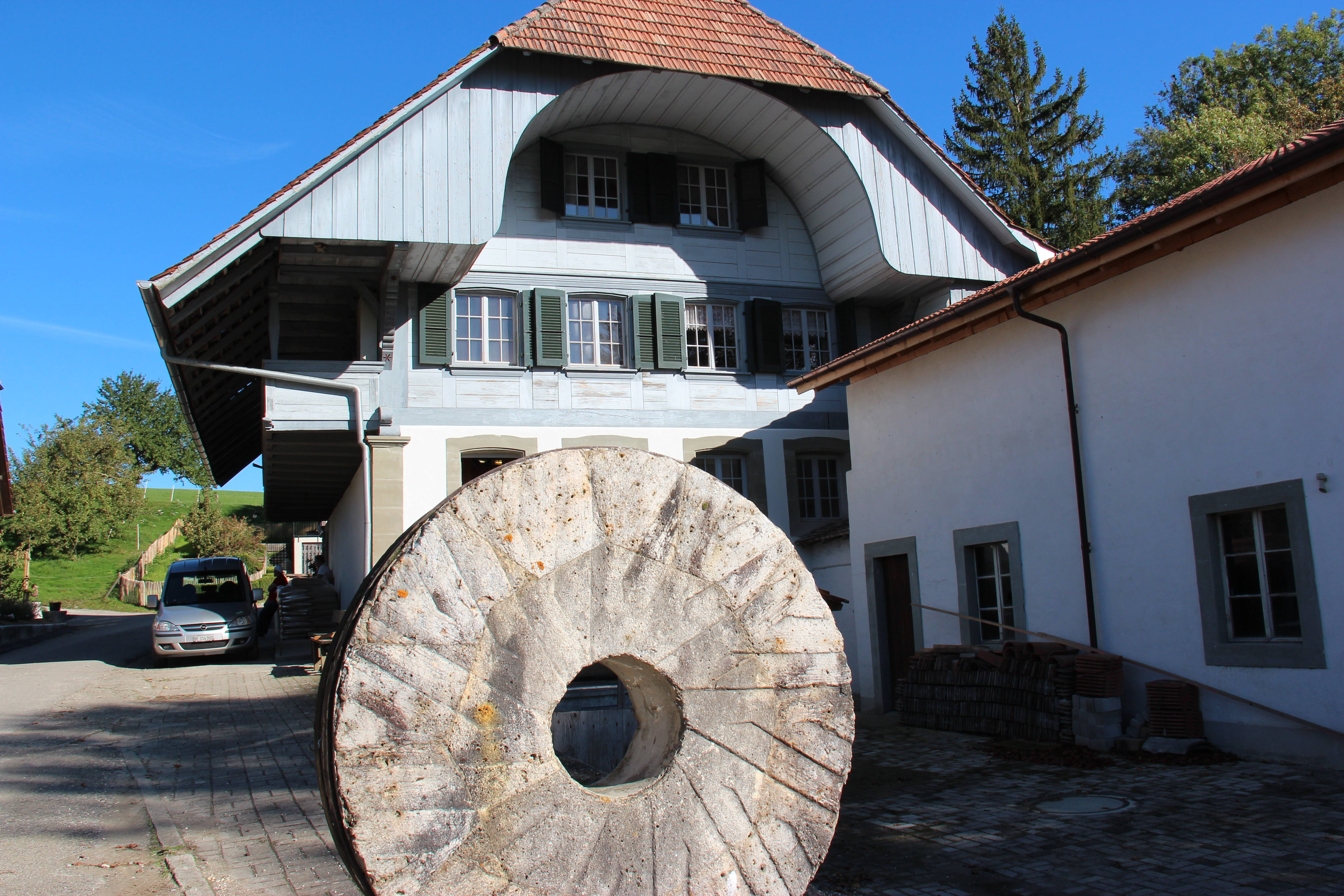 In der SAT-Mühle des Burgerlichen Jugendwohnheims können Jugendliche aus schwierigen Verhältnissen erste Schritte in der Arbeitswelt tätigen.